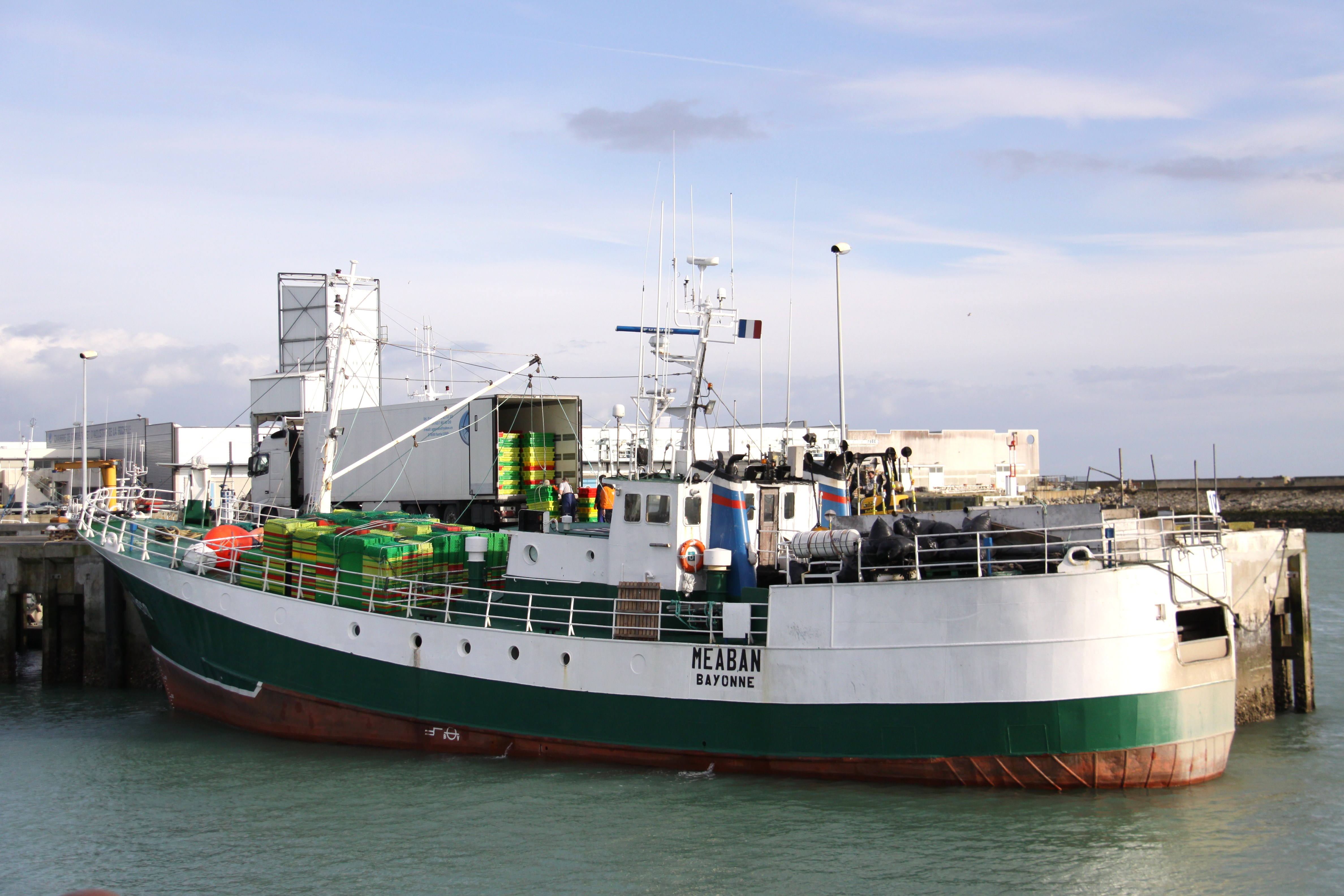 Le "Meaban" au port de pêche de Chef de Baie. Le bateau de pêche "Meaban" est un ancien chalutier semi-industriel construit en 1965 et transformé en palangrier-fileyeur en 1994. Il mesure 33,25 mètres de long et 7,75 mètres de large. La puissance de son moteur est de 552 kw. Sa coque est en métal. Immatriculation: BA 288920. La Rochelle (Port de Pêche de Chef de Baie), Charente Maritime, France.